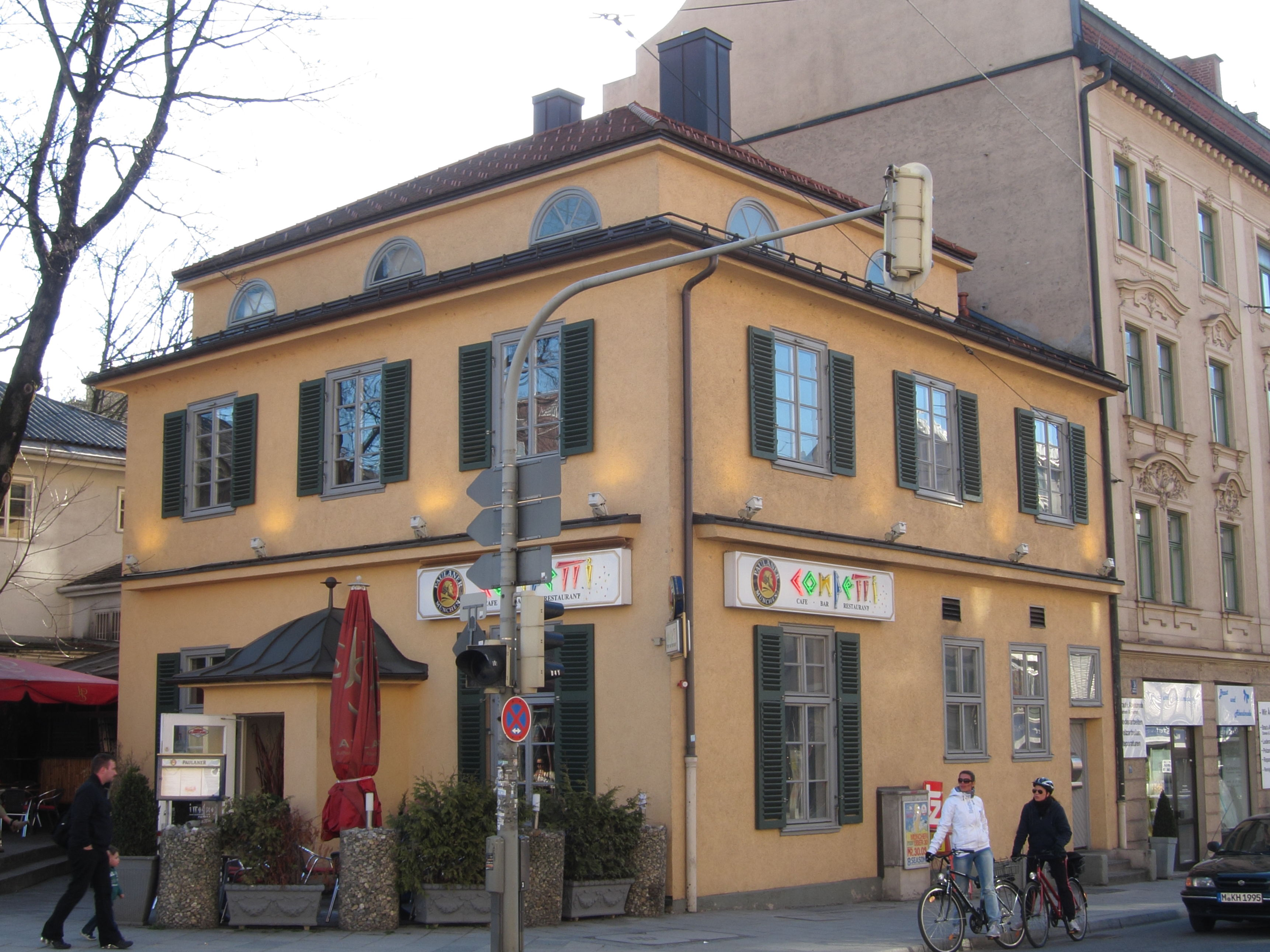 Bodenseestraße 1; Eckhaus, klassizisierend, 1921 von Josef Lang. Das Gebäude ist weitgehend bekannt als "Pappschachtel."